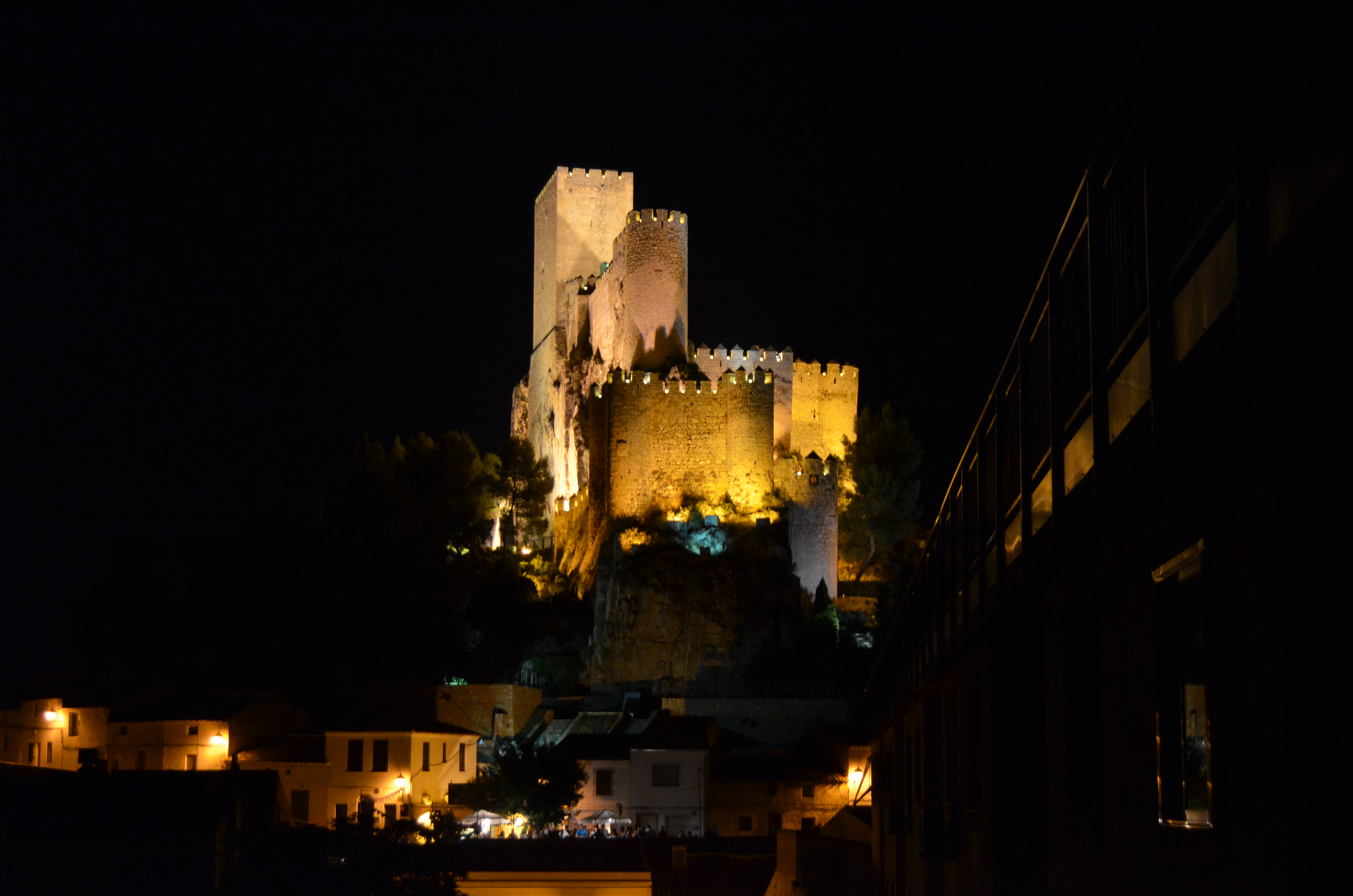 Vista panorámica del Castillo de Almansa (Albacete - España), Fotografía tomada el 20 de Agosto de 2011.